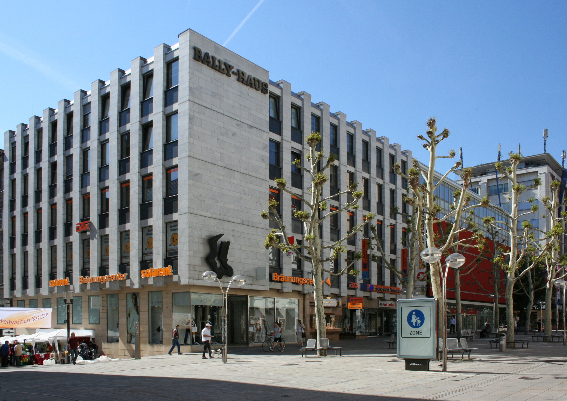 Bally-Haus, Königstraße , Stuttgart